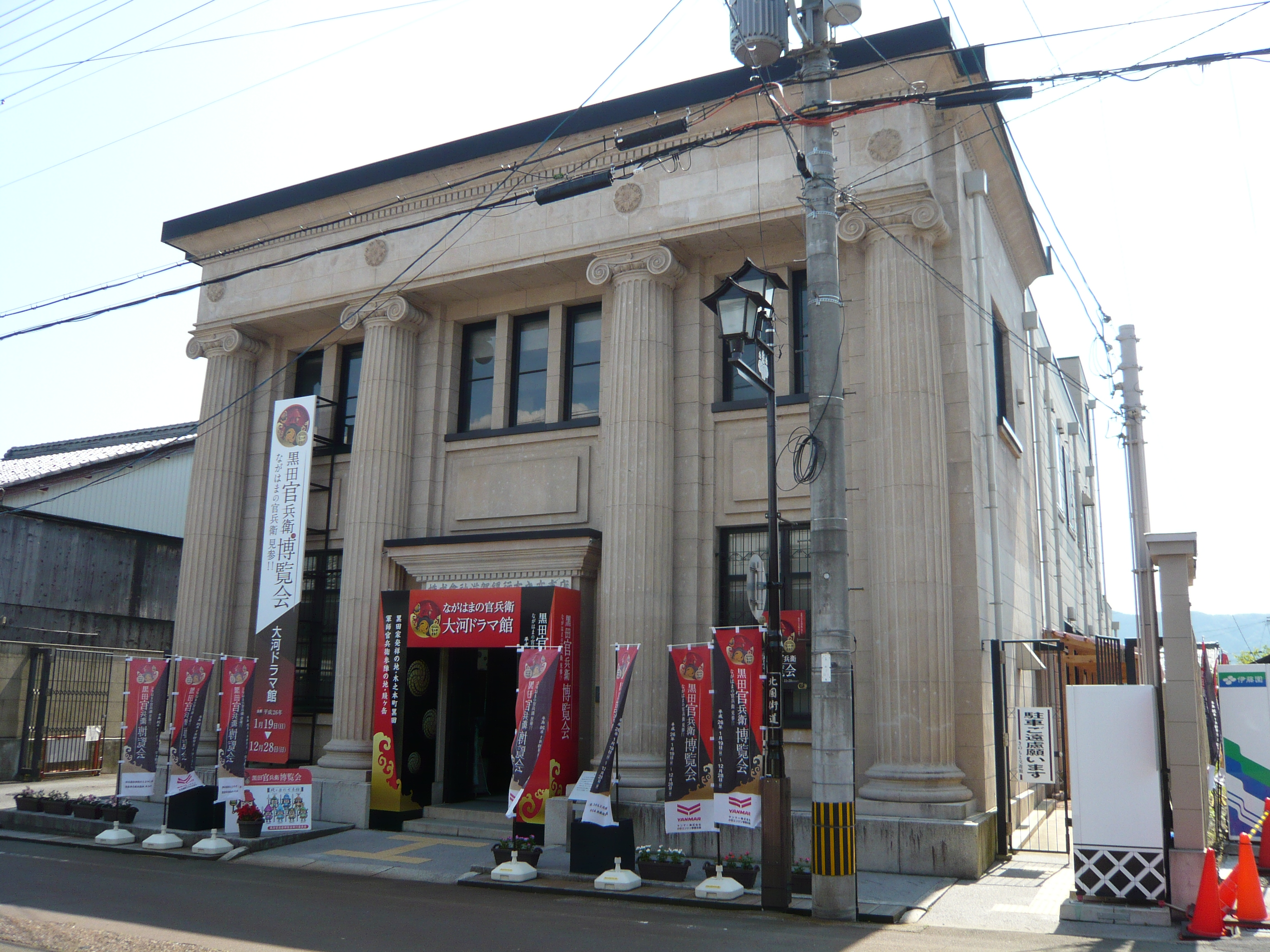 きのもと交流館